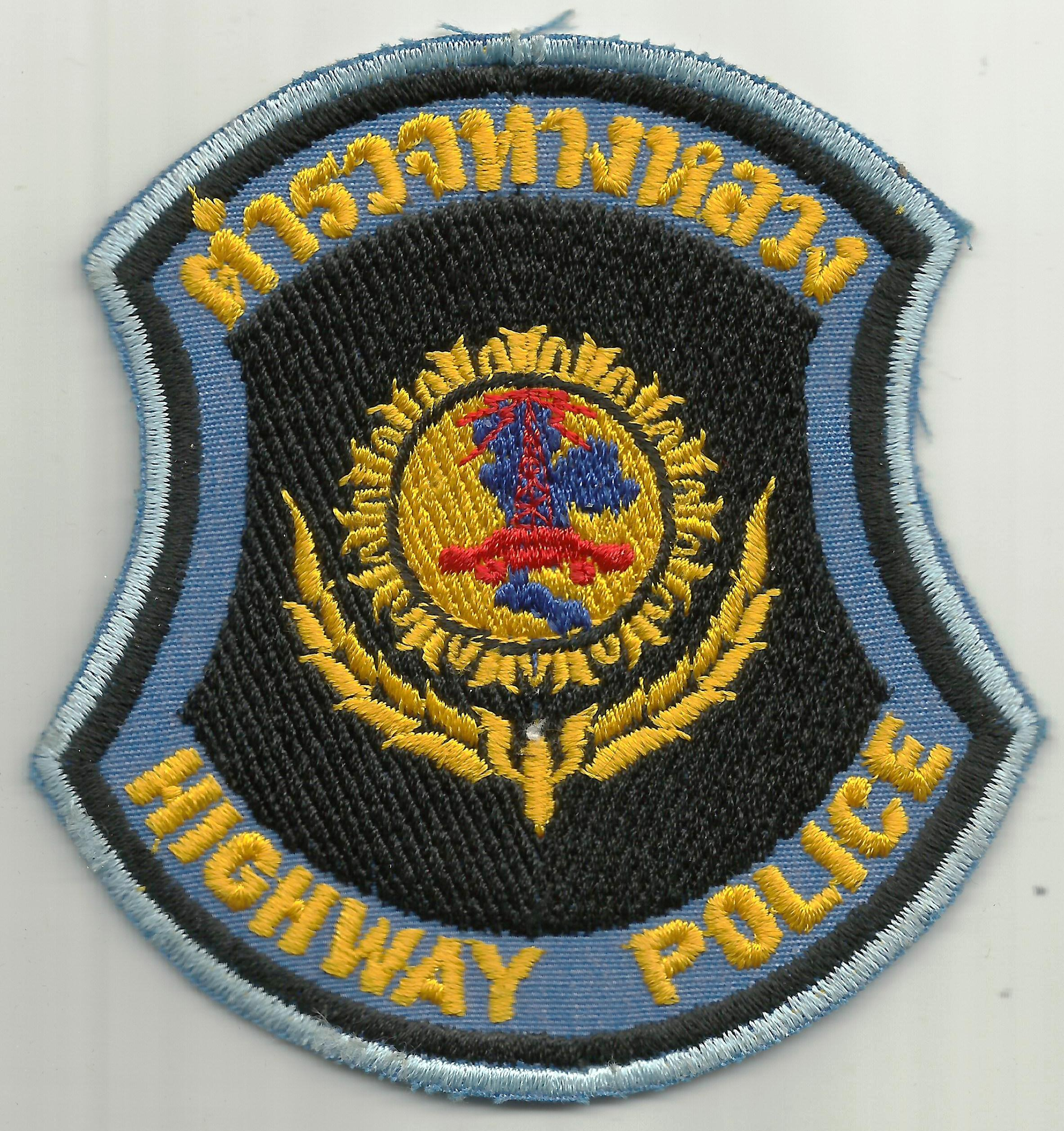 Thailand Highway politie embleem